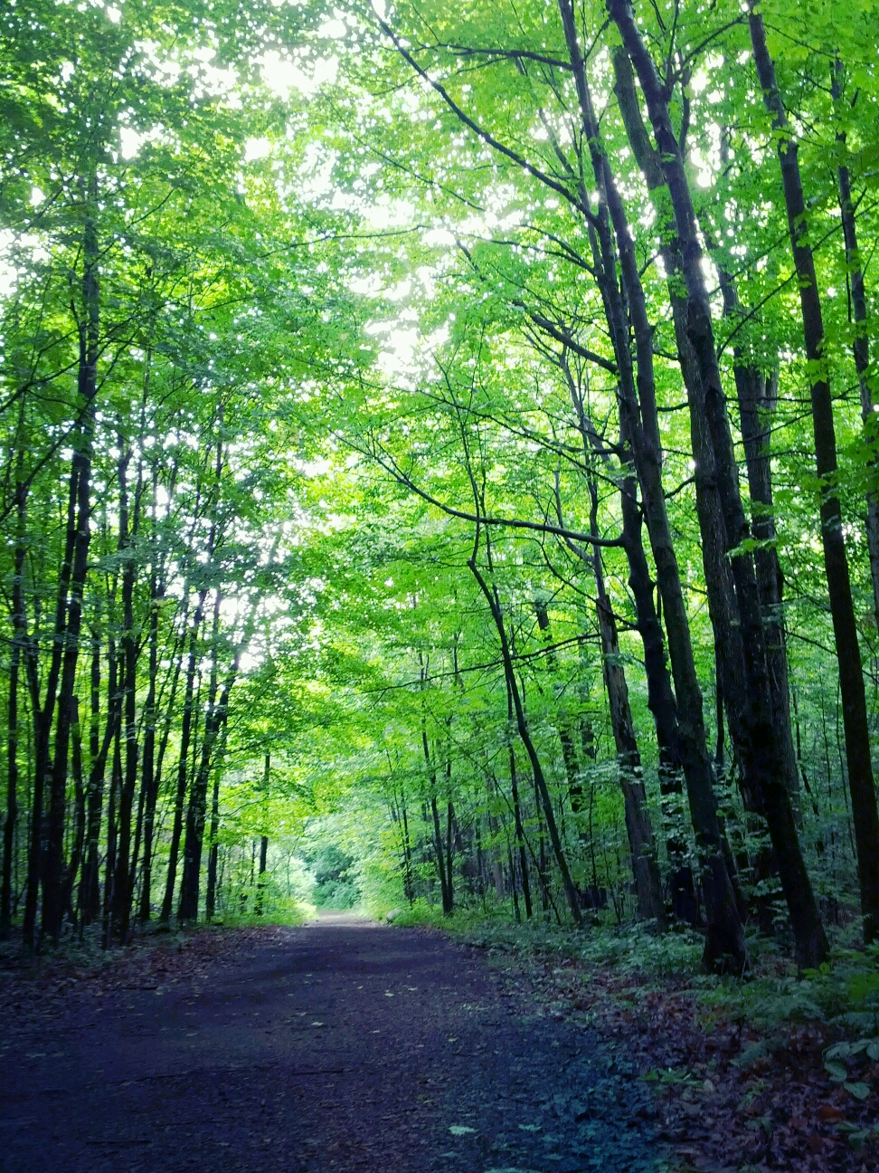 Tunnel d'arbres...